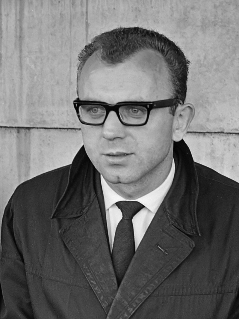 Europa Cup . Esbjerg tegen PSV 3-4. Van Wissen op reservebankje 25 september 1963